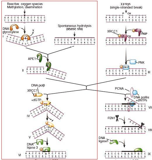 la voie du BER